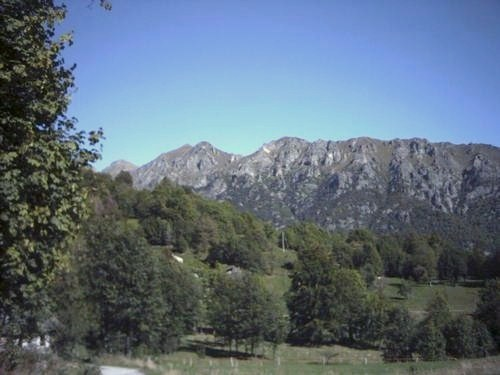 Vallorsera